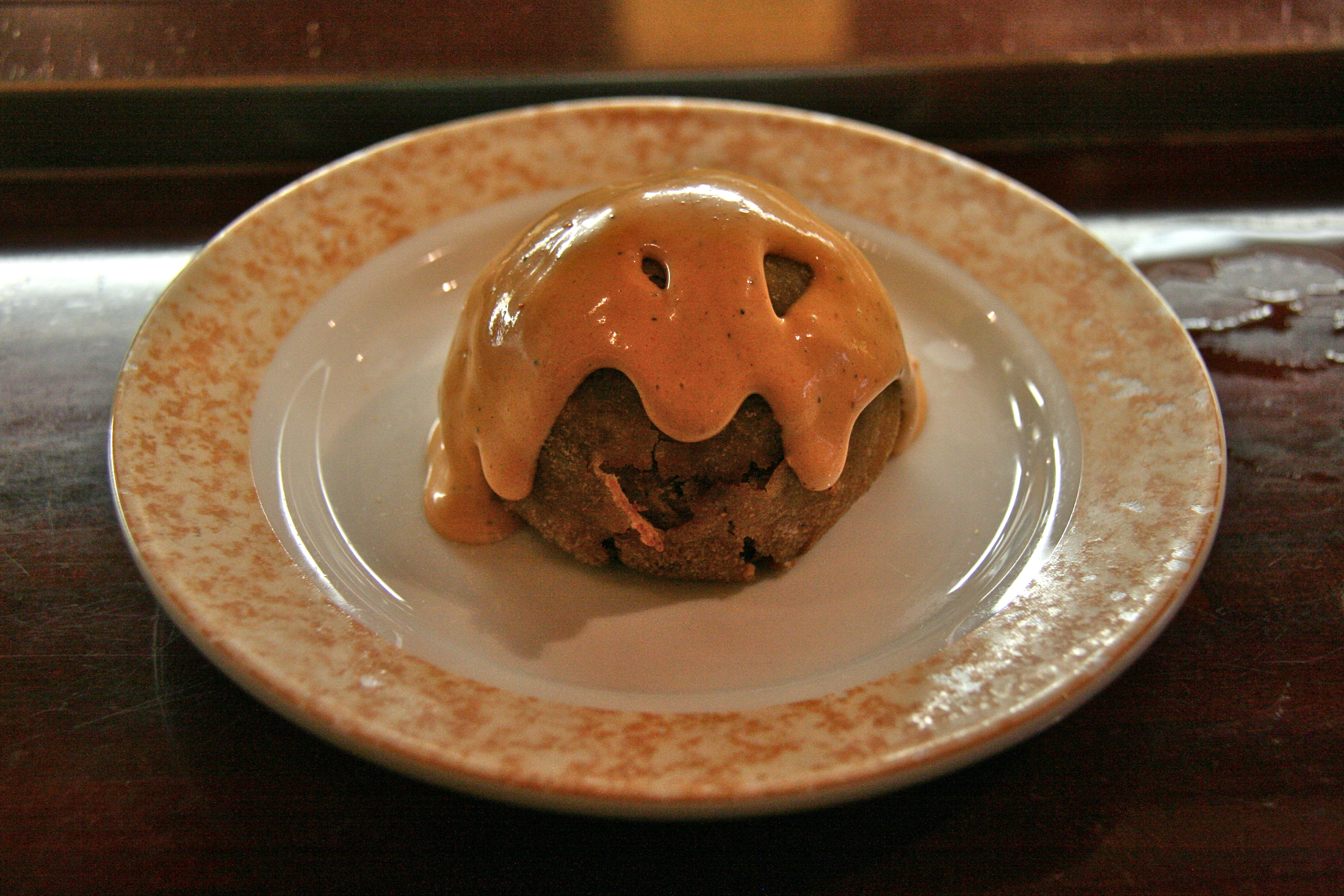 Bomba - Tapa